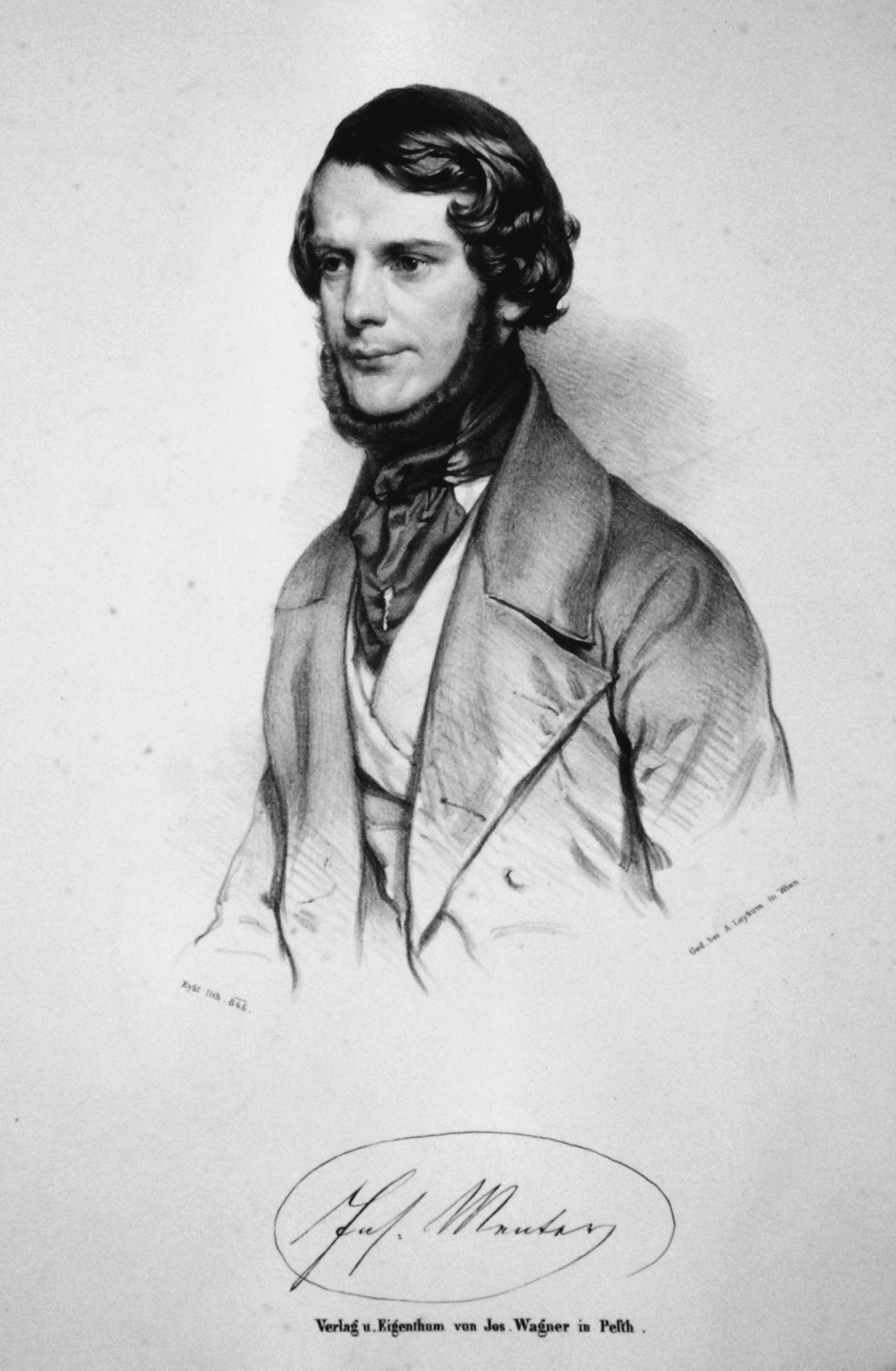 Joseph Menter (1808-1856), Cellist, Komponist, Kapellmeister und Musikpädagoge. Lithographie von Franz Eybl, 1845